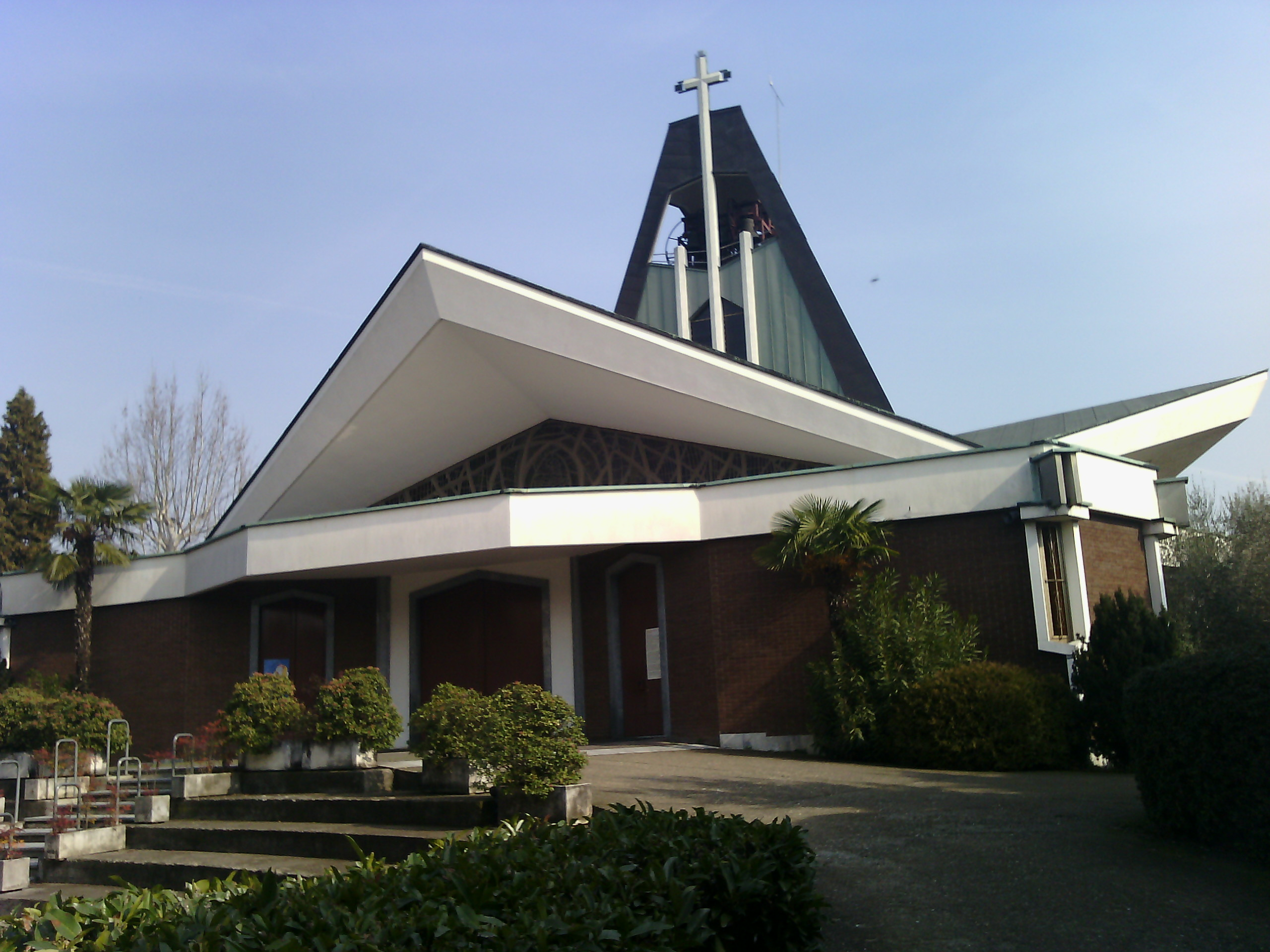 Chiesa parrocchiale di Mesero (MI) - Italia